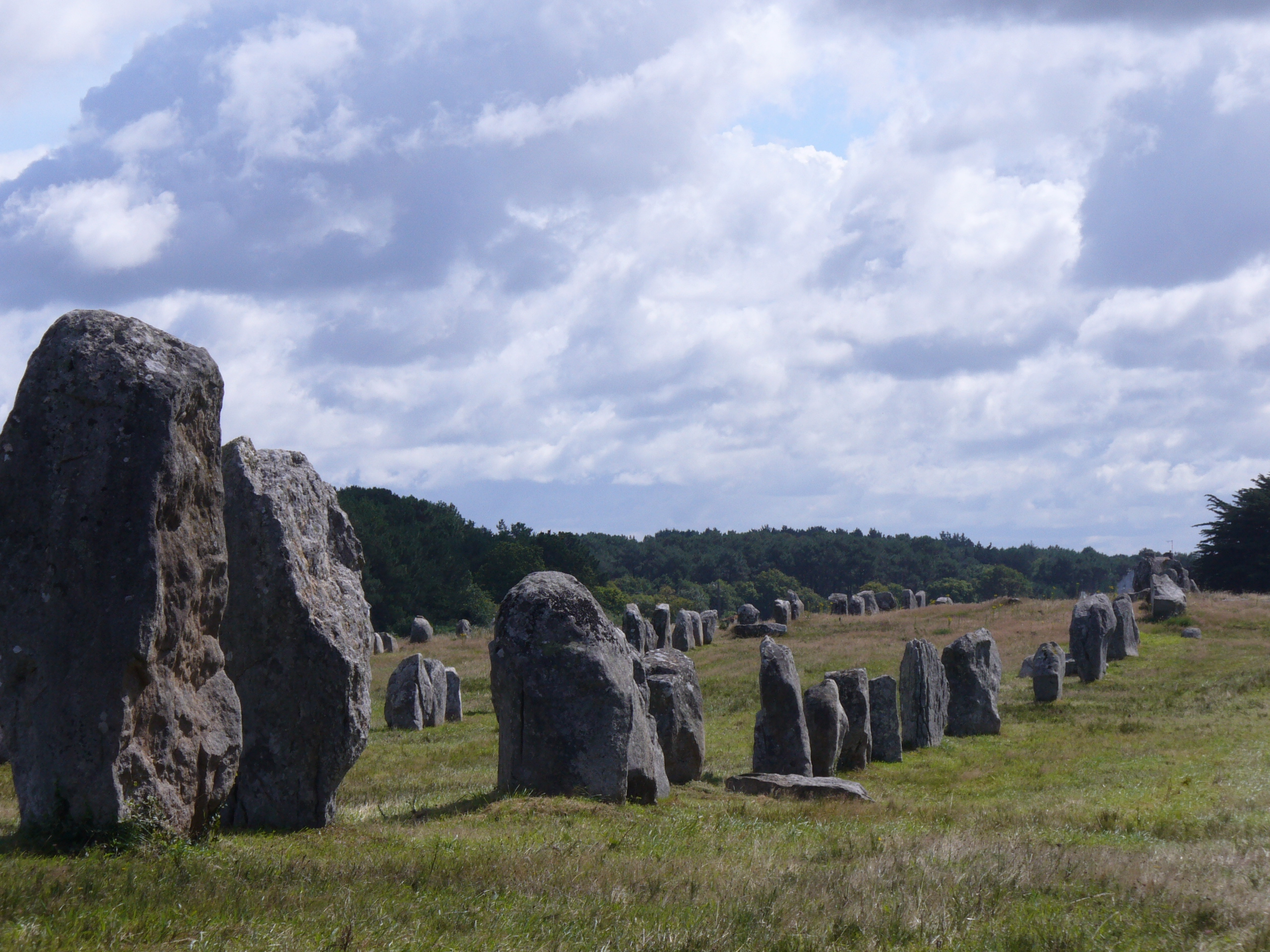 1099 Menhire,bis zu 4 Meter hoch,von Ost nach West in 1167 Meter Langen Alignements(Steinreihen) in einem Halbkreis(Cromlechs) endend. (Jungsteinzeit, Neolithikum ,Neolithic ,Néolithique 4500-2300 v.Chr.) Megalithanlage von Le Ménec, Carnac ,Departement Morbihan ,Bretagne